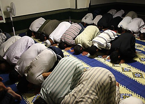 Ṣalāt